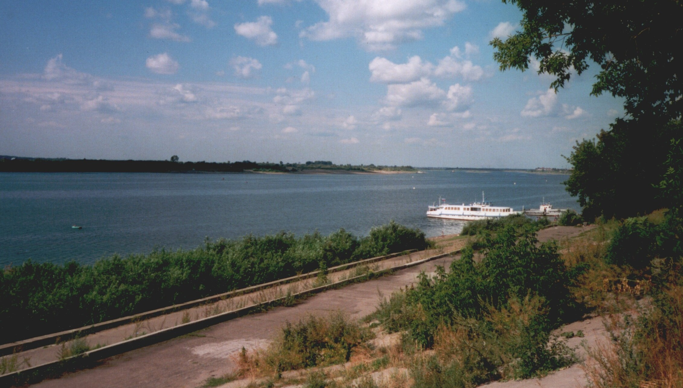 Der Fluss Tom in der Stadt Tomsk